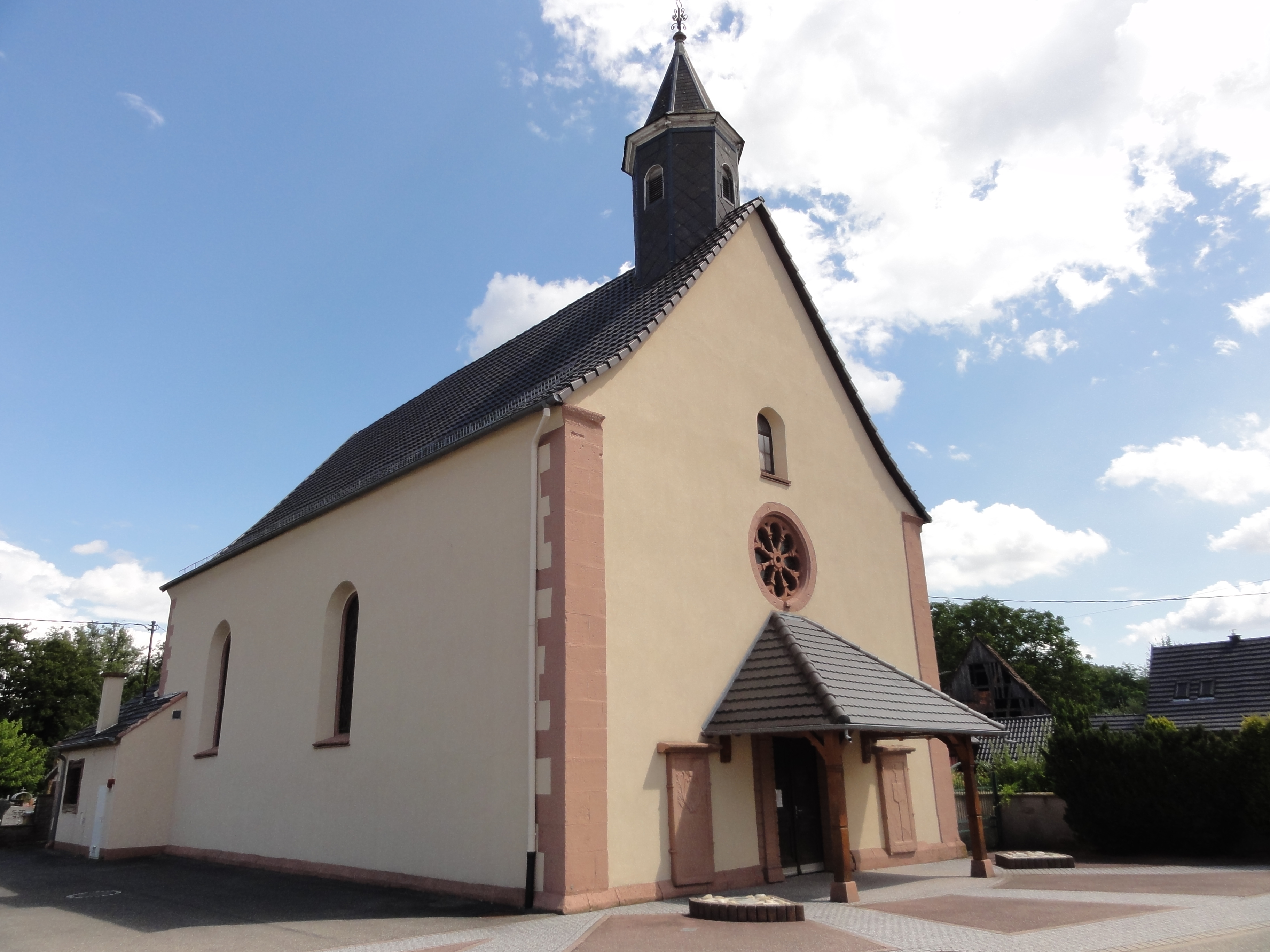 Alsace, Bas-Rhin, Église Saint-Jean-Baptiste de Biblisheim (IA67007763).